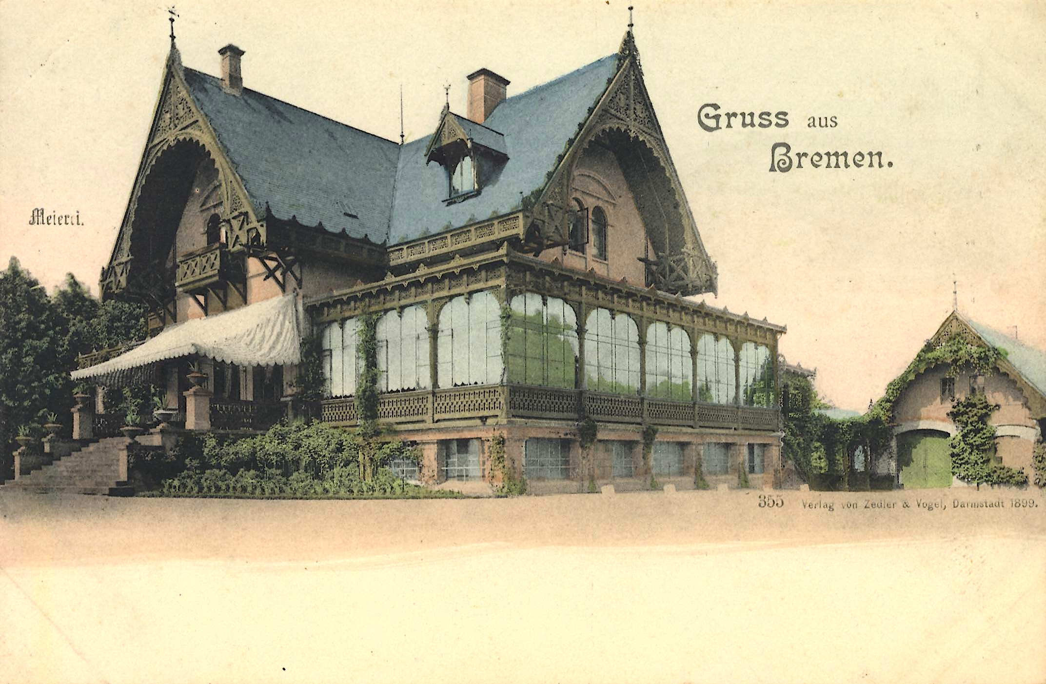 Die Meierei im Bürgerpark in Bremen, Deutschland, auf einer historischen Ansichtskarte des Verlags Zedler & Vogel, Darmstadt.